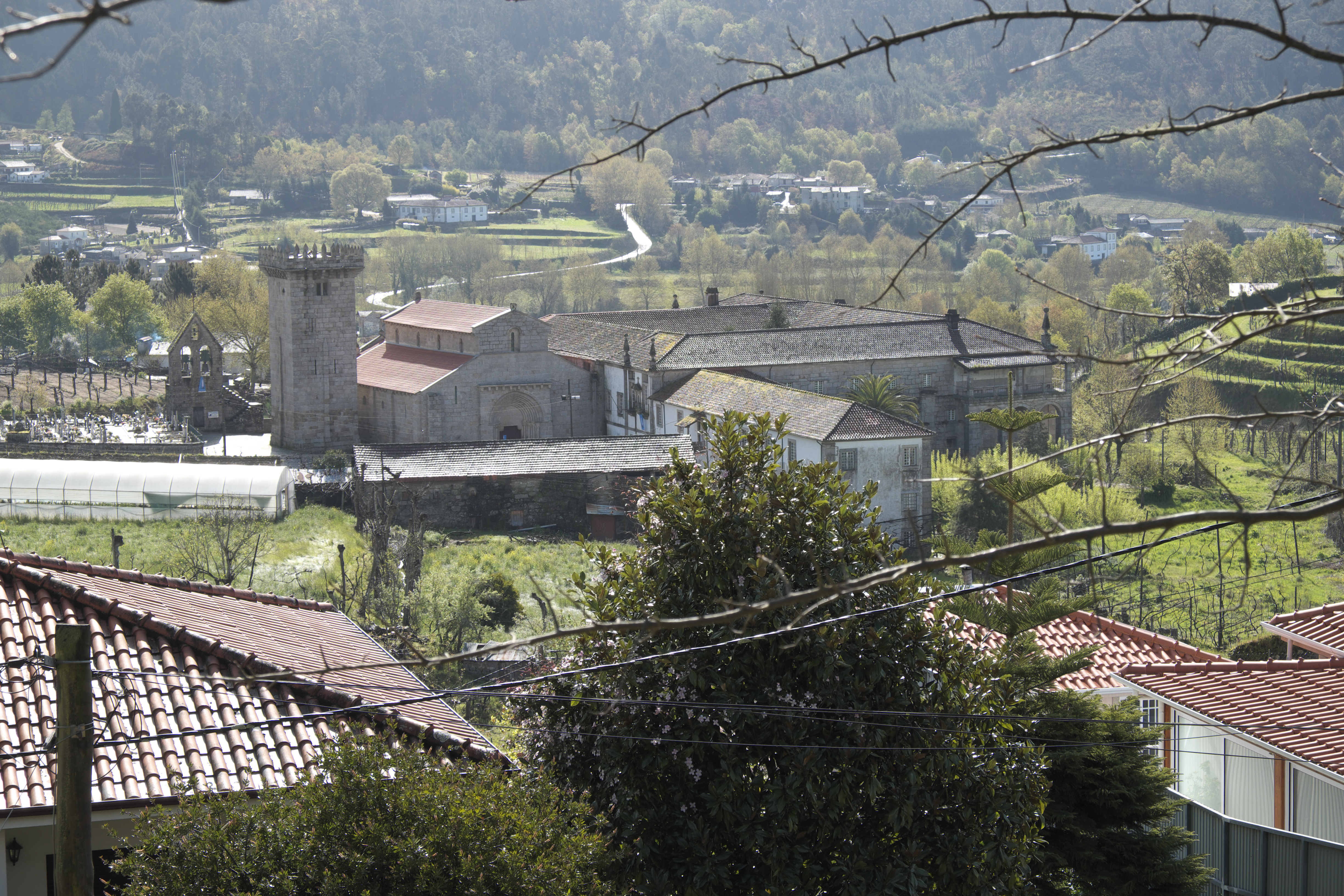 Ehemaliges Benediktinerkloster São Salvador in Travanca (Amarante) im Distrikt Porto in Nordportugal